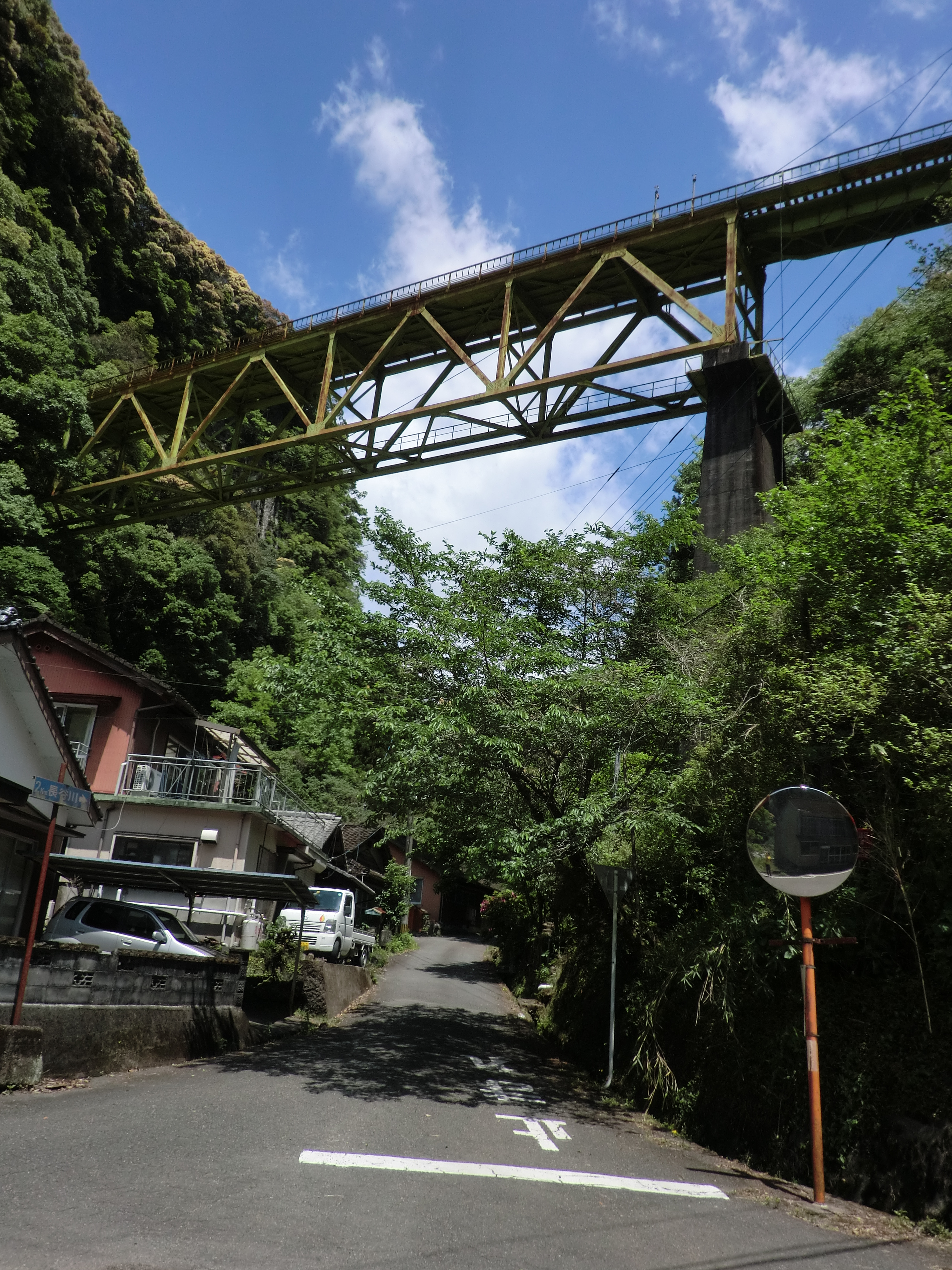 影待集落の上を通る旧高千穂鉄道の鉄橋遺構